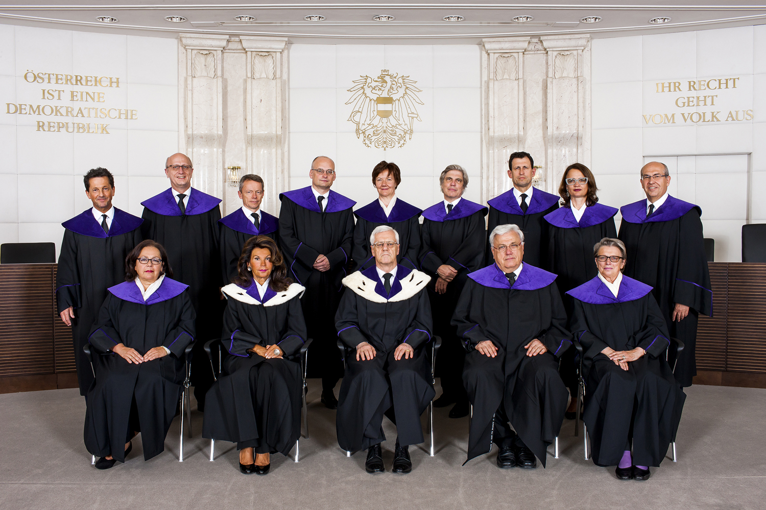 Gruppenfoto der Zusammensetzung des österreichischen Verfassungsgerichtshofs im Juni 2015.Vorne (v.l.n.r.): Claudia Kahr, Vizepräsidentin Brigitte Bierlein, Präsident Gerhart Holzinger, Rudolf Müller, Eleonore Berchtold-OstermannHinten (v.l.n.r.): Christoph Herbst, Georg Lienbacher, Markus Achatz, Michael Holoubek, Ingrid Siess-Scherz, Johannes Schnizer, Christoph Grabenwarter, Sieglinde Gahleitner, Helmut Hörtenhuber